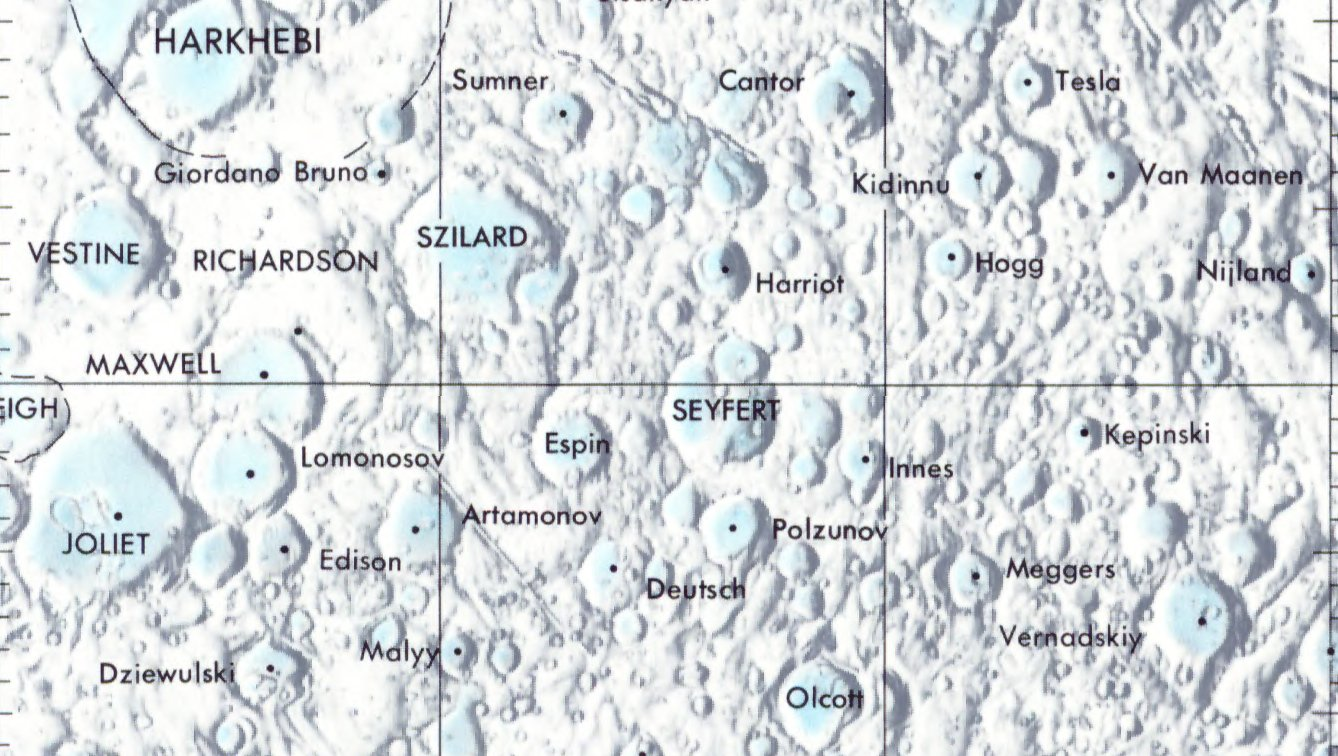 Cráter lunar Seyfert. Localización. (Lunar Chart LPC1. Second Edition)